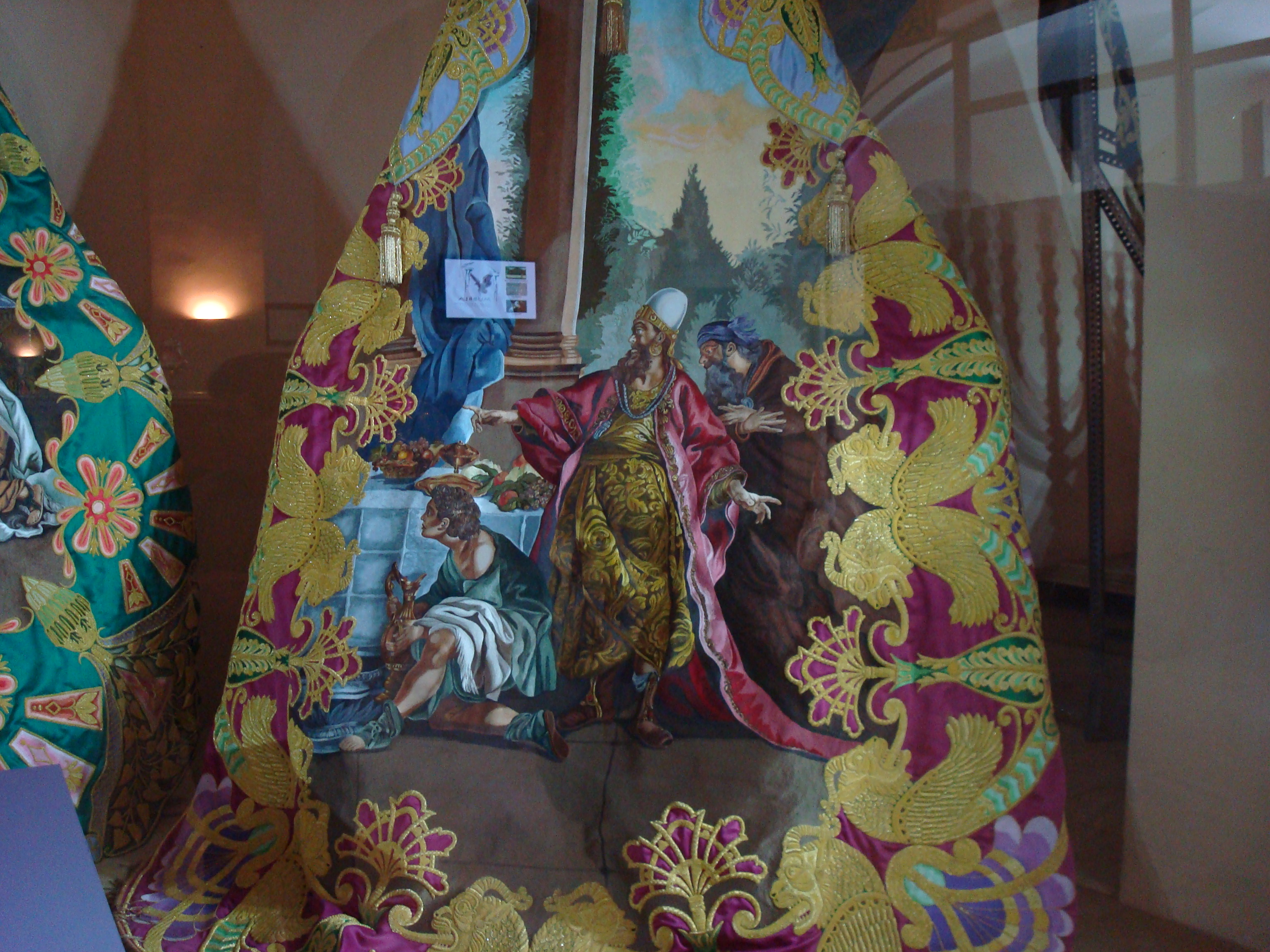 Manto de Asuero, Semana Santa Lorca